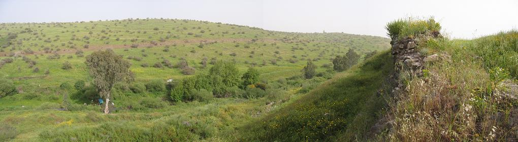 תצלום פנורמי של החומה המזרחית של מצד עתרת ונהר הירדן. צילמתי, ערכתי והעלתי באפריל 2006. אסף.צ 22:30, 14 אפריל 2006 (UTC)